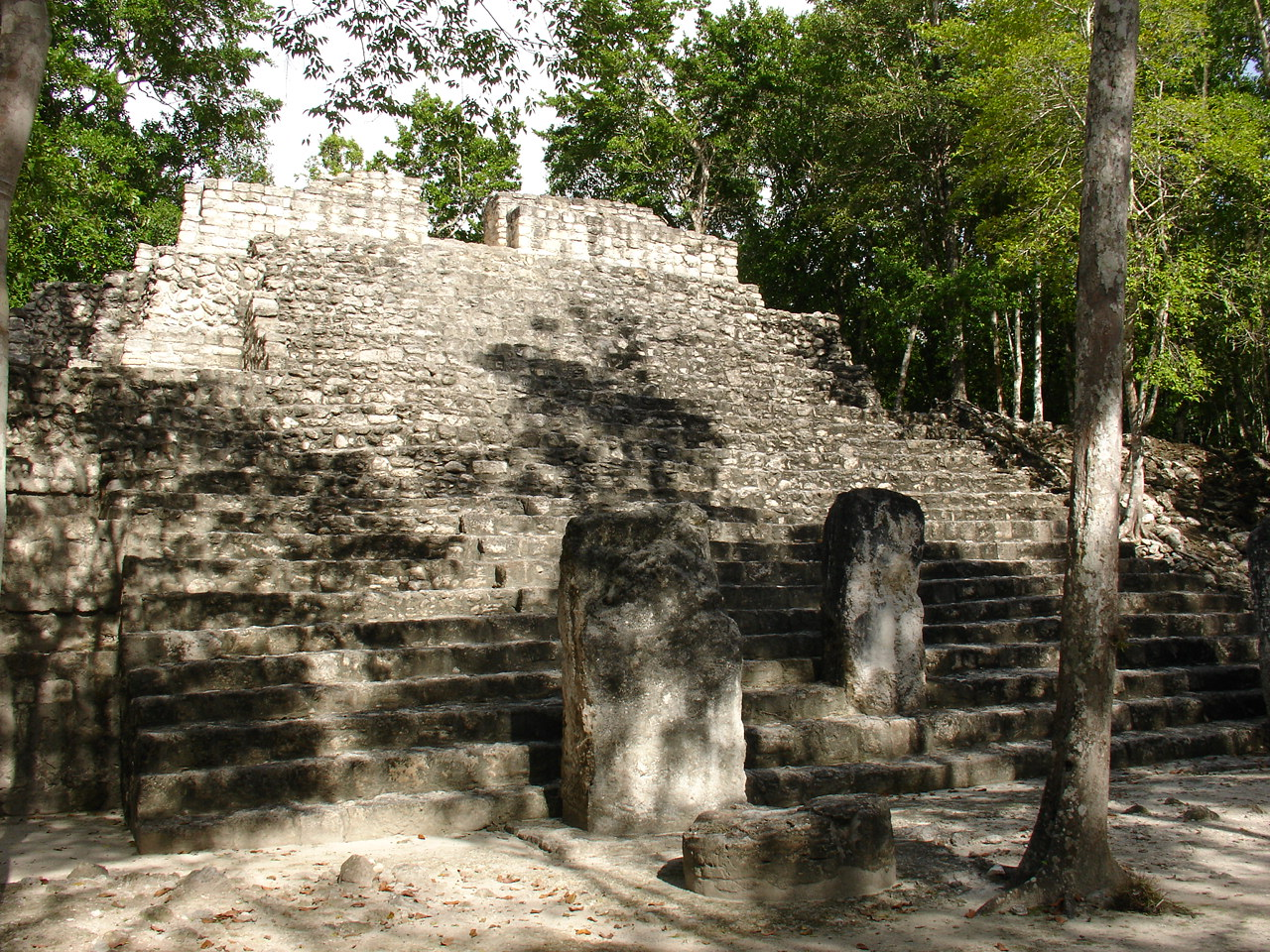 Zona arqueológica de Calakmul.